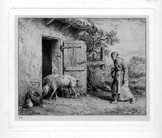 eau forte de Charles Jacque, 1848 sur chine appliquée